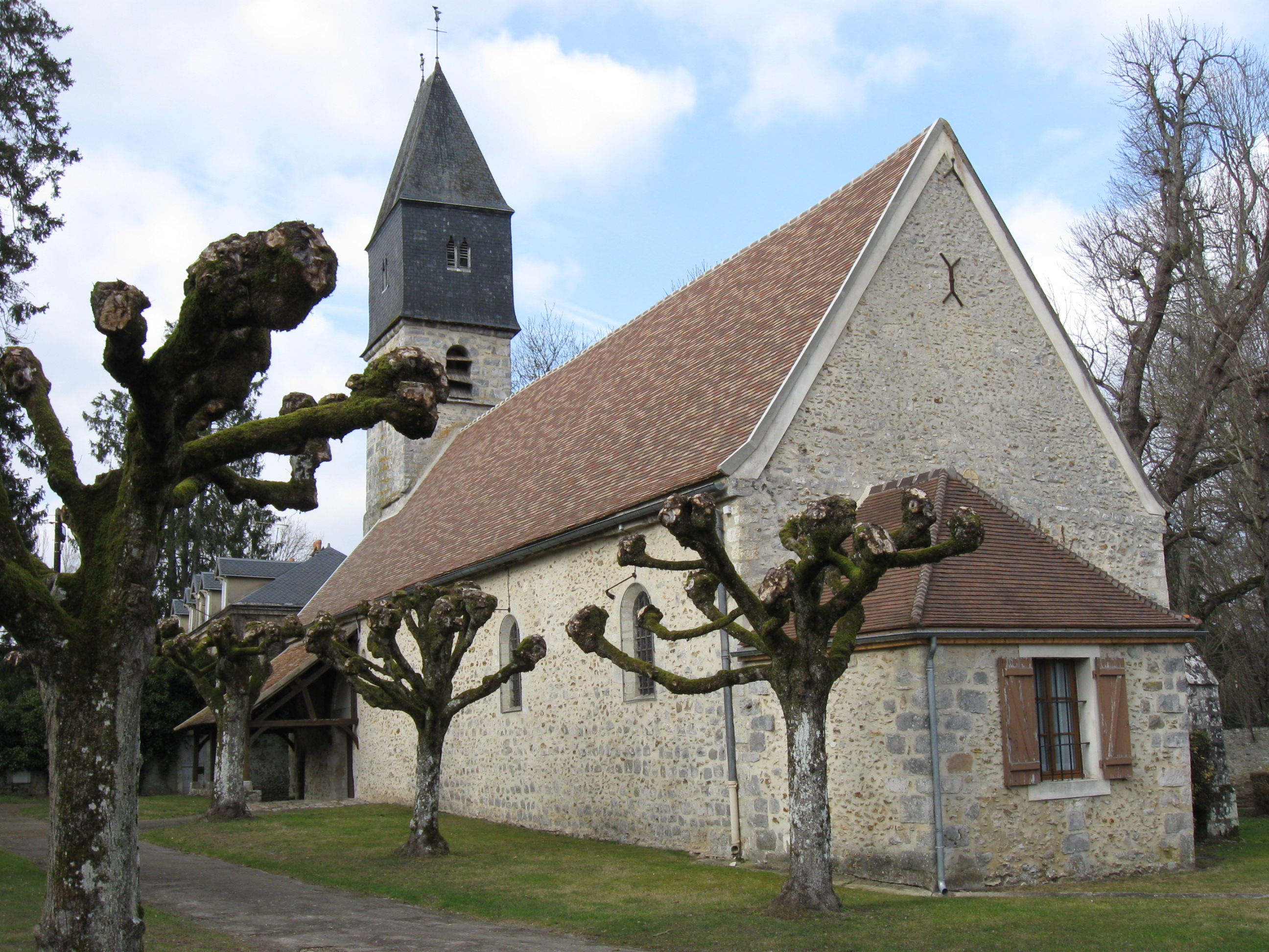 L'église paroissiale Saint-Pierre de Poigny-la-Forêt (département des Yvelines, région Île-de-France).